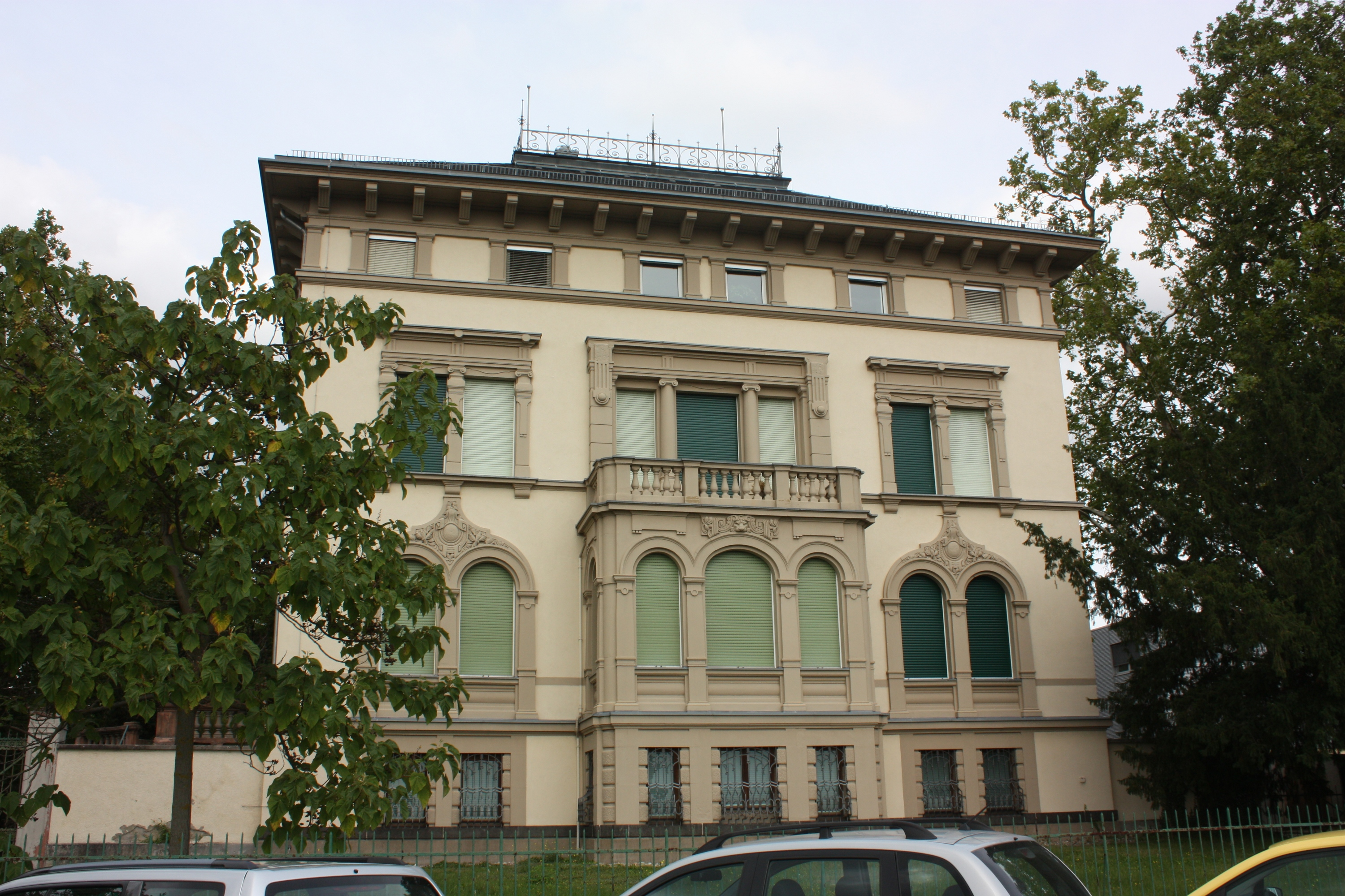 Hochheim, Hessen: Villa Burgeff um 1900 errichtet